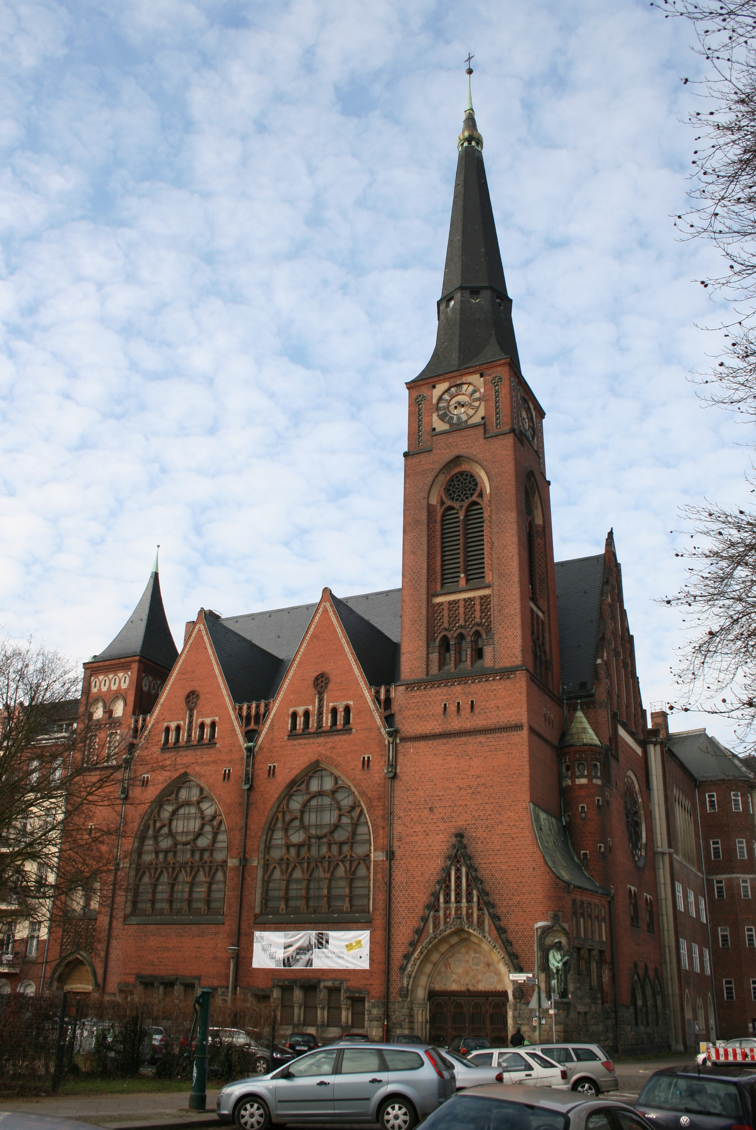 Zwinglikirche, Berlin, Germany